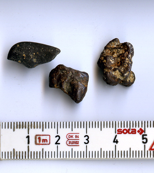 Bohnerz / iron Ore.